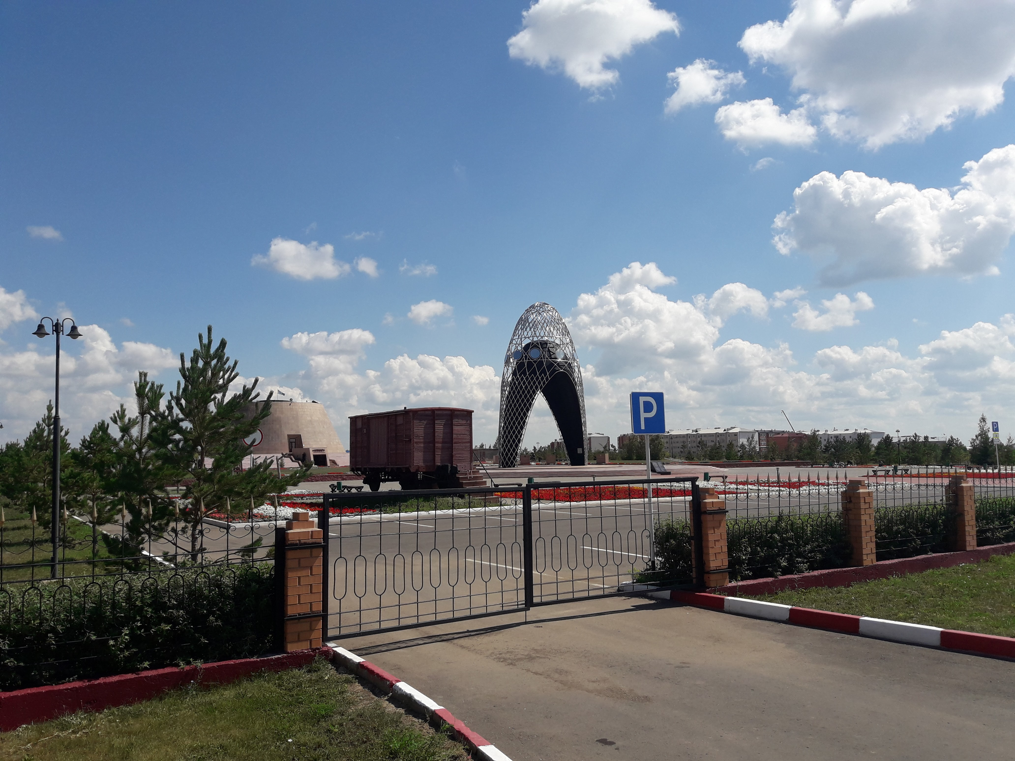 AŁŻIR